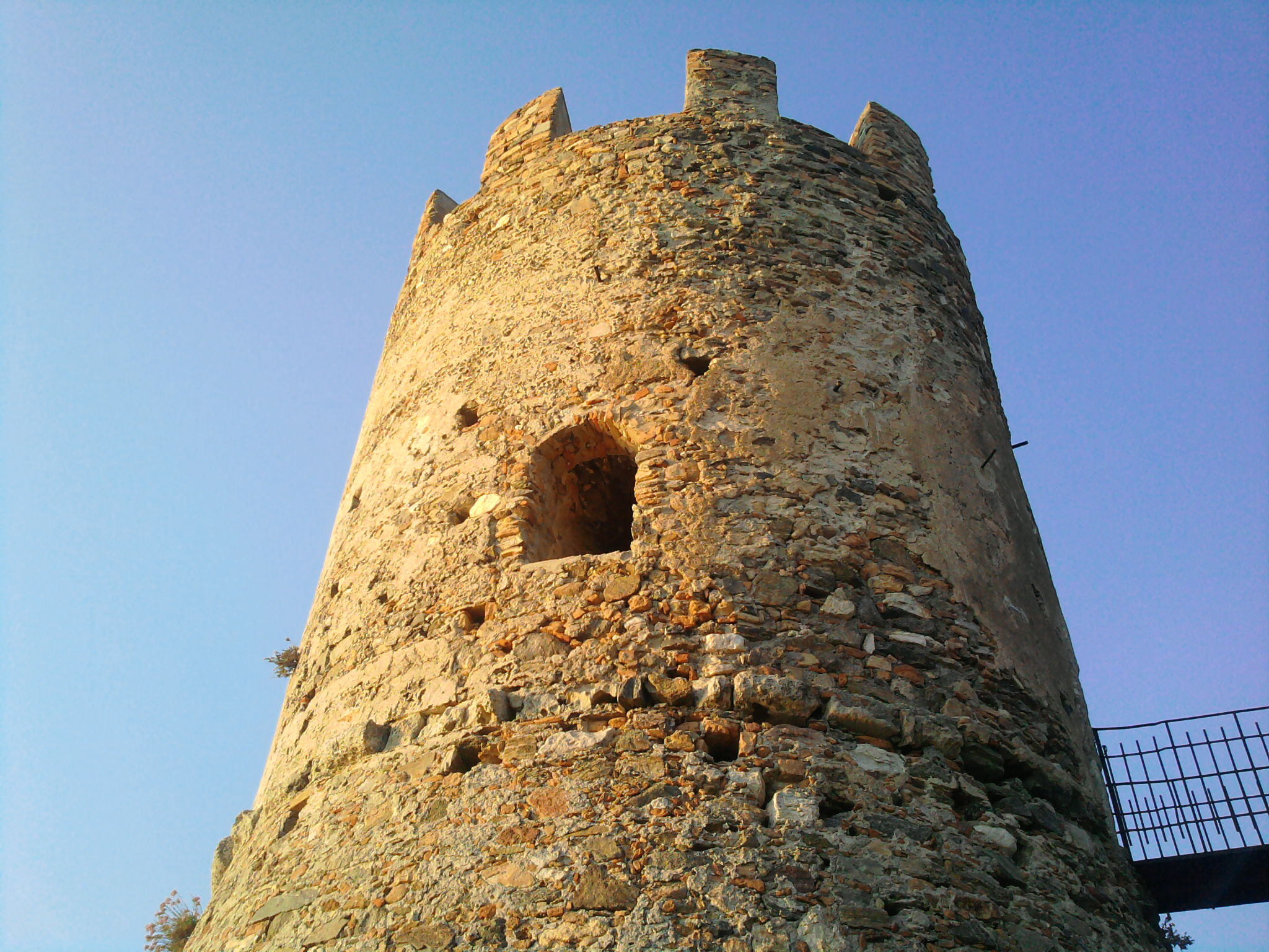 Vista della torre medioevale saracena di palmi, anticamente chiamata "di Pietrenere"